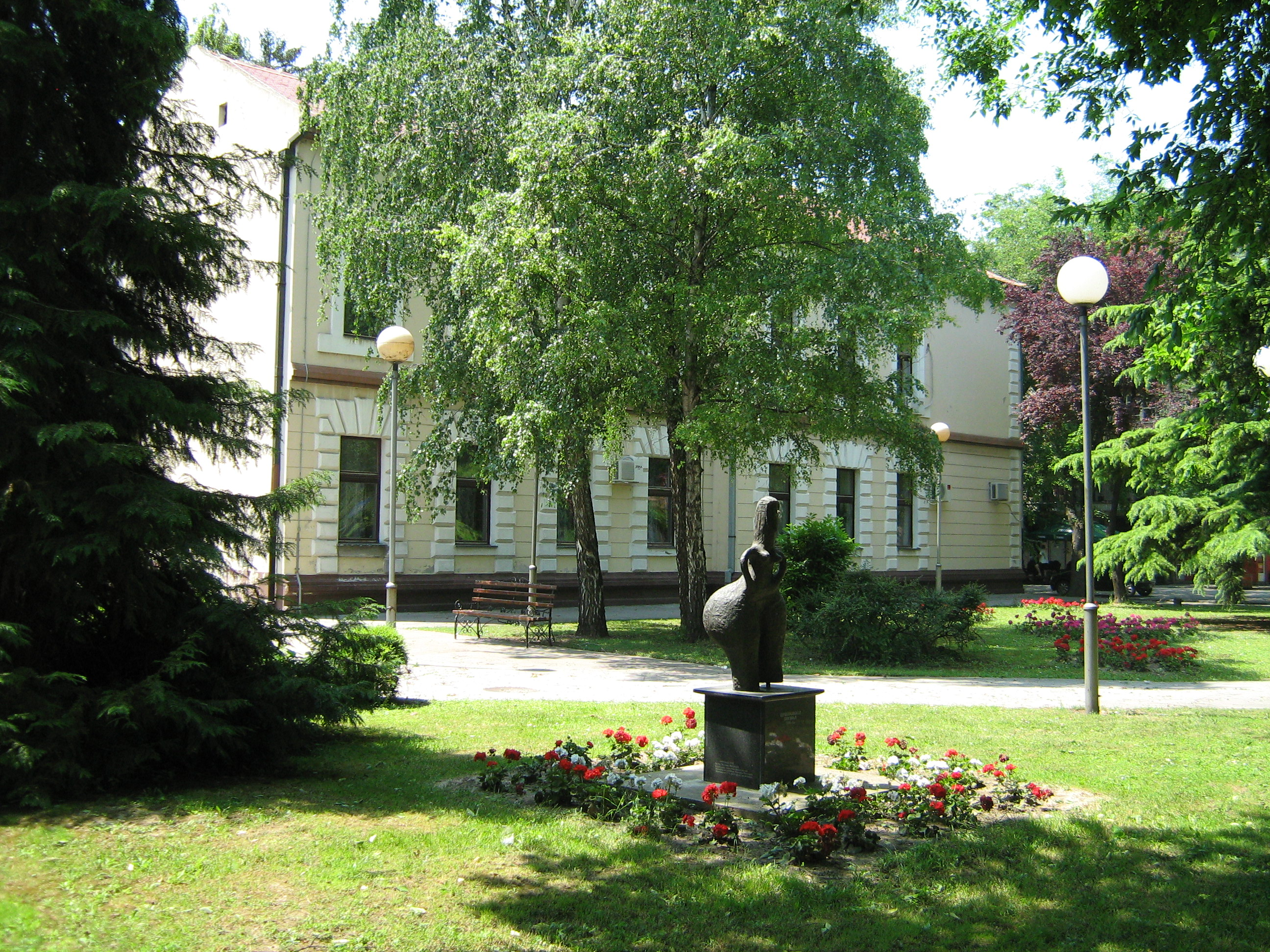 Crvenokosa boginja Odžaci